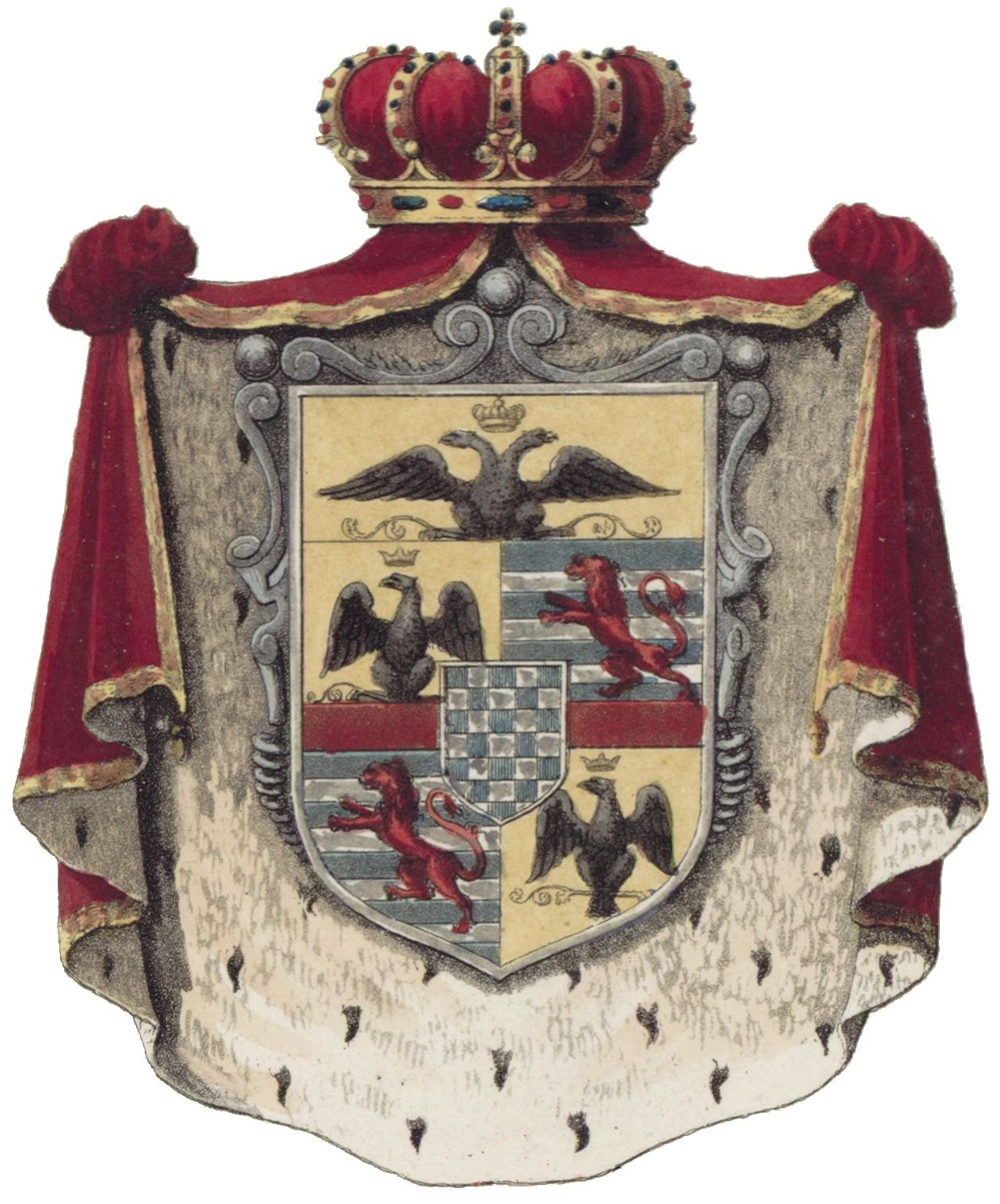 Stemma della famiglia Pico della Mirandola Lo scacco celeste ed argento con fasce rosse è lo stemma della famiglia ‘’Pico’’: l’aquila nera con testa incoronata in campo d’oro è quello della Mirandola, e il leone rappresenta lo stemma di Concordia, luogo compreso nella sovranità della Mirandola. L’aquila fu adottata nel 1311 dalla famiglia ‘’Pico’’, quando la provincia della Mirandola fu innalzata alla dignità di Vicariato imperiale. Introdottosi l’uso dell’aquila a due teste per impresa dell’impero, i ‘’Pico’’ la inserirono nel loro stemma, mantenendo egualmente l’aquila con una testa per dinotare la comunità di Mirandola, cui l’antico stemma di un capriolo (‘’chévron’’) d’oro in campo azzurro fu poi restituito nel 1742 dagli ‘’Estensi’’.